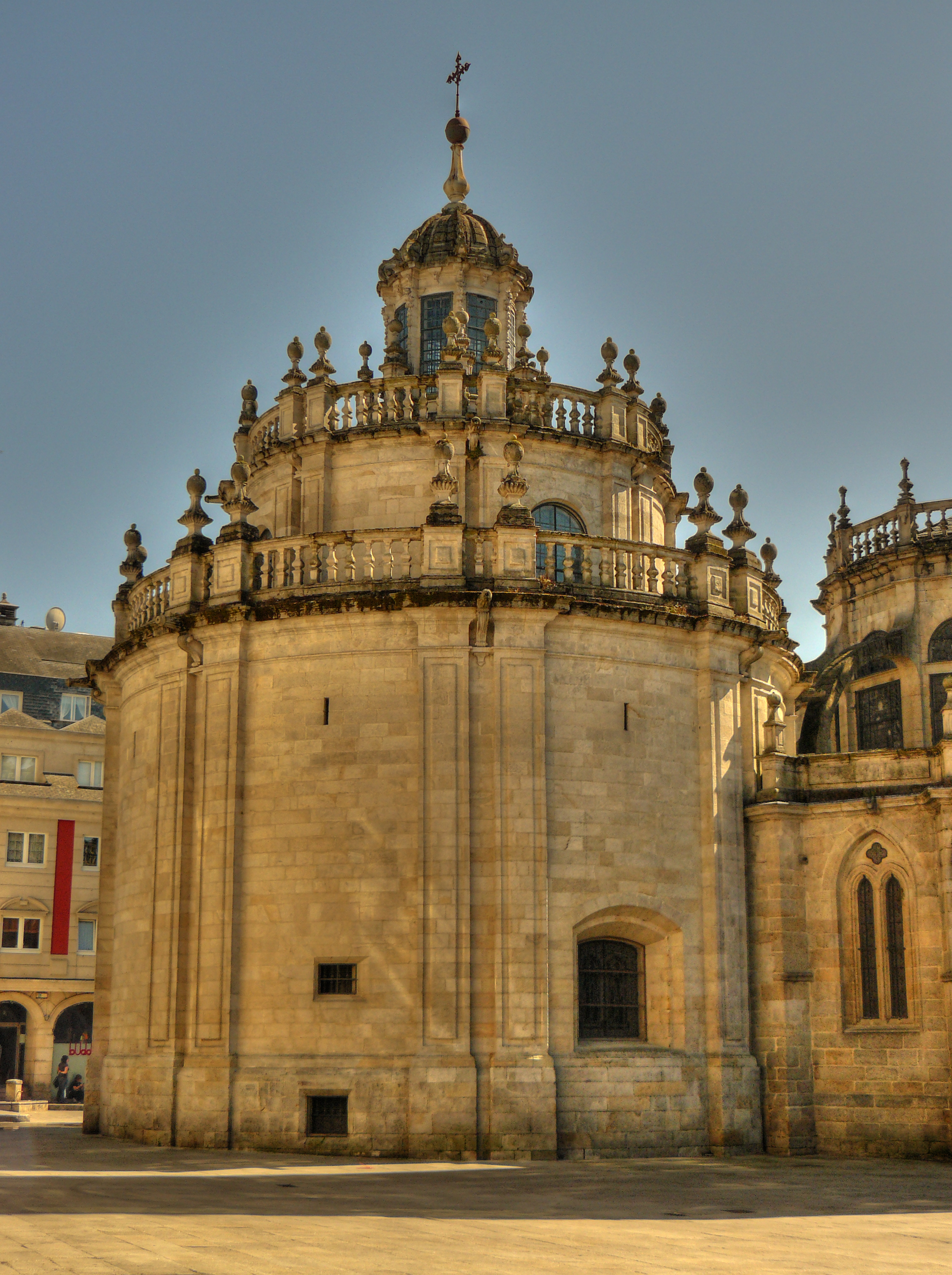 Catedral de Lugo